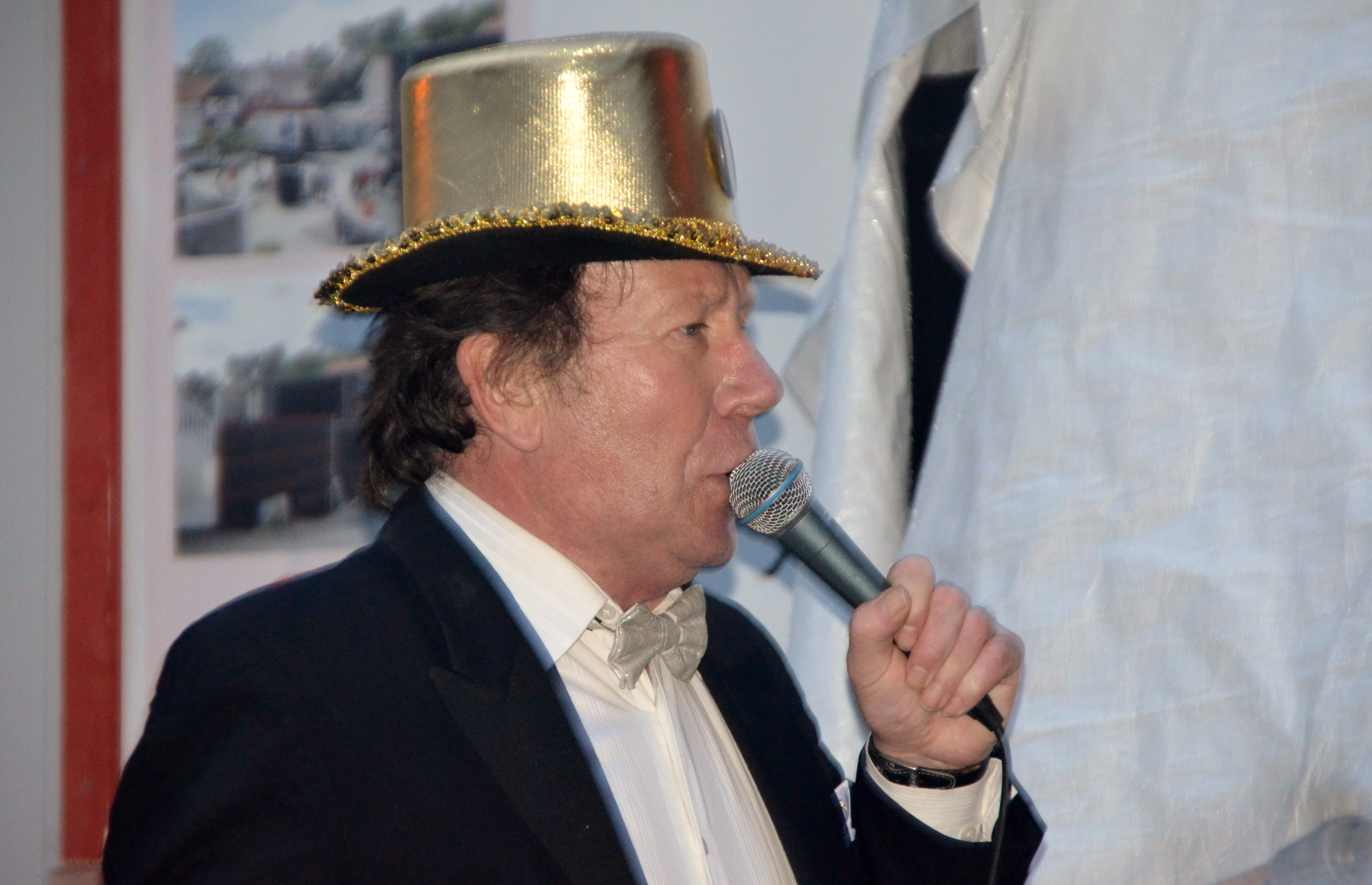 Frode Rønli fra Stavangerensemblet i Langesund i 2011.